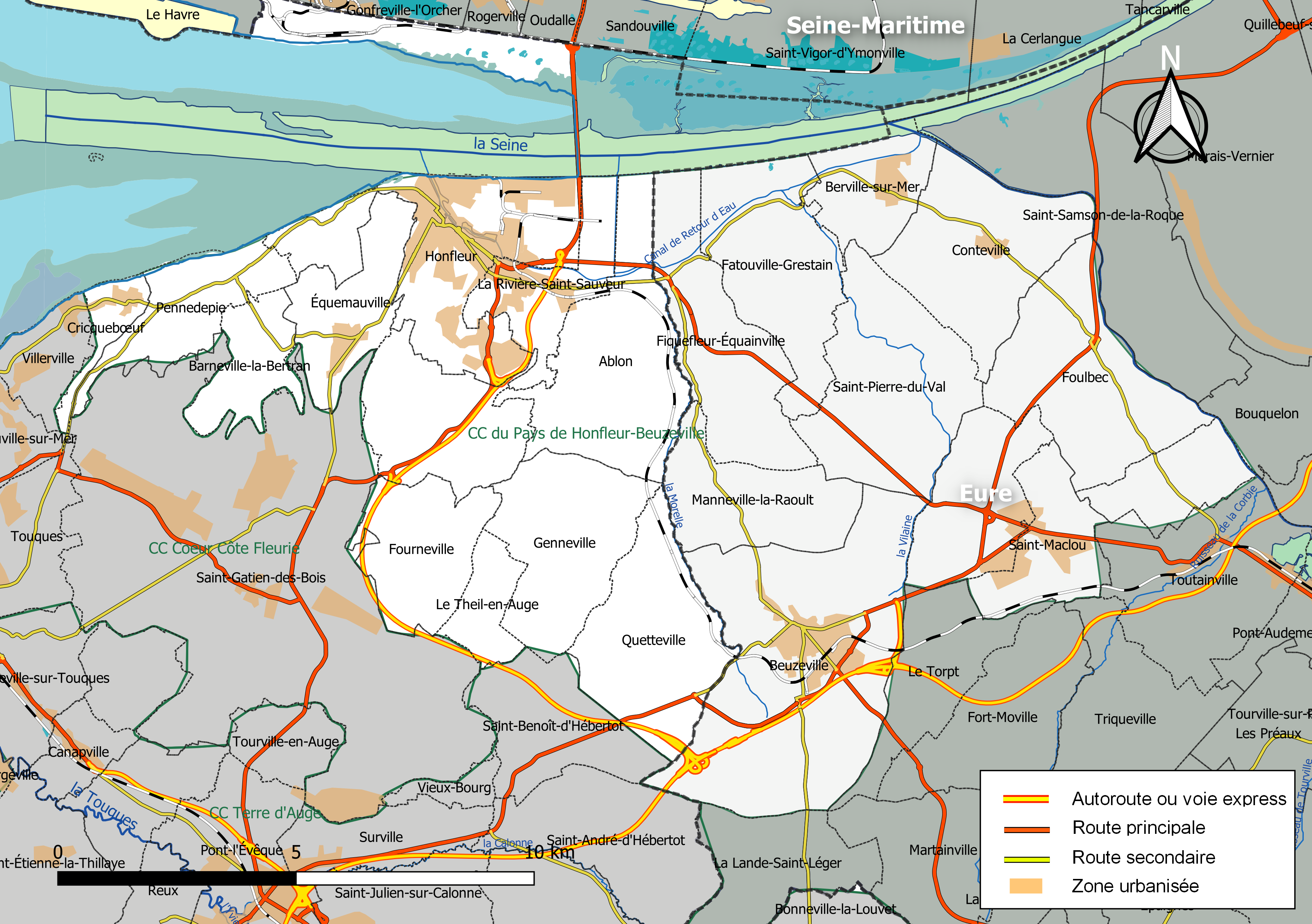 Carte géographique de la Communauté de communes du Pays de Honfleur-Beuzeville, département du Calvados, France. Composition au 1er janvier 2019.